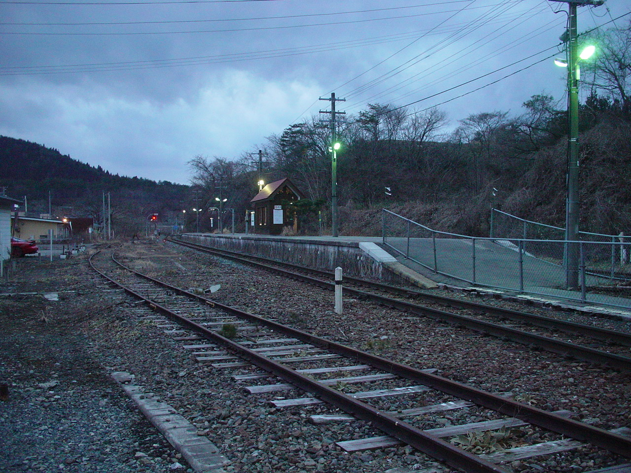 （鱒沢駅）